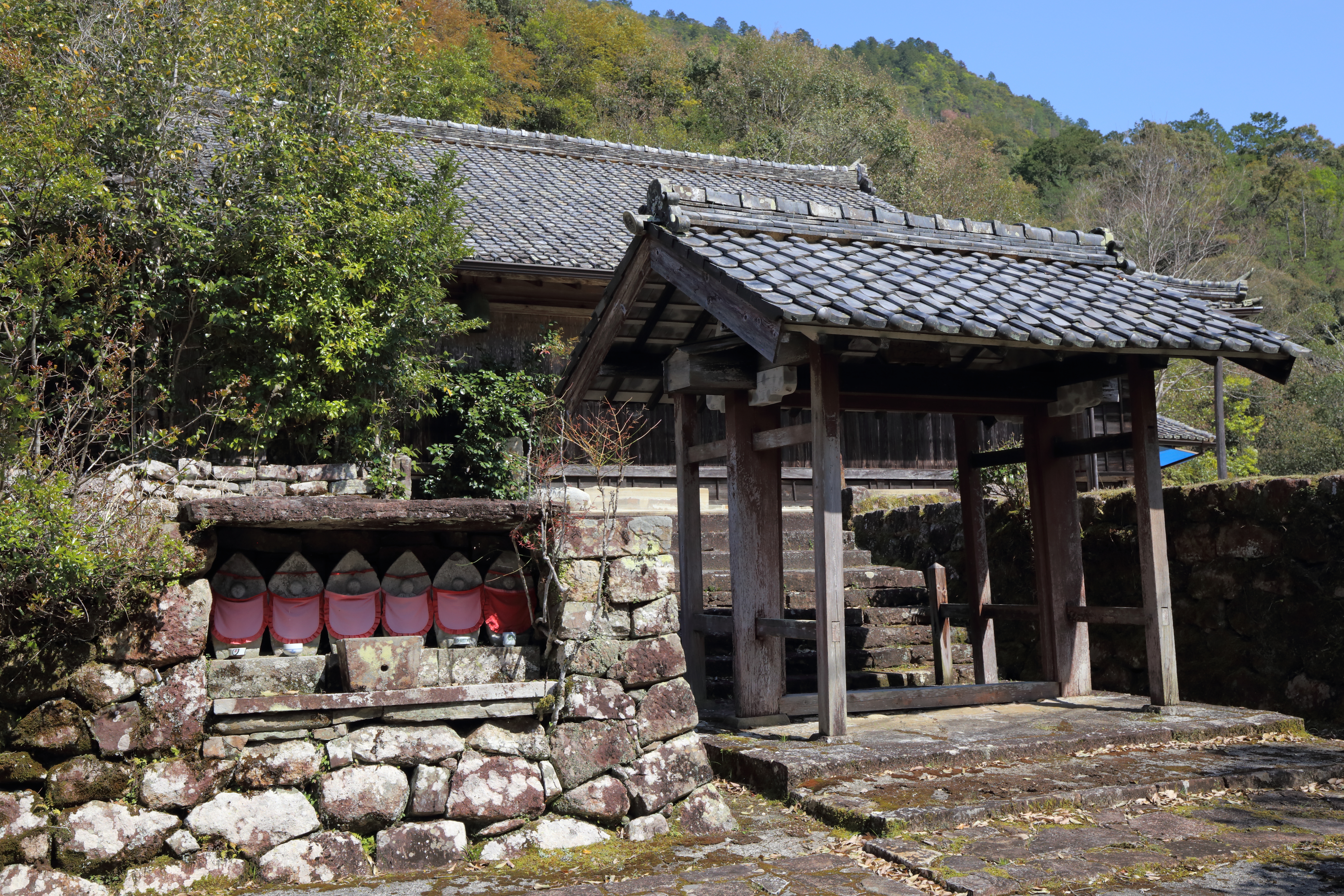 臨済宗延命山吉祥寺 三重県熊野市紀和町花井 紀和町花井